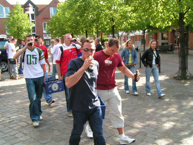 Bierathleten in Aktion